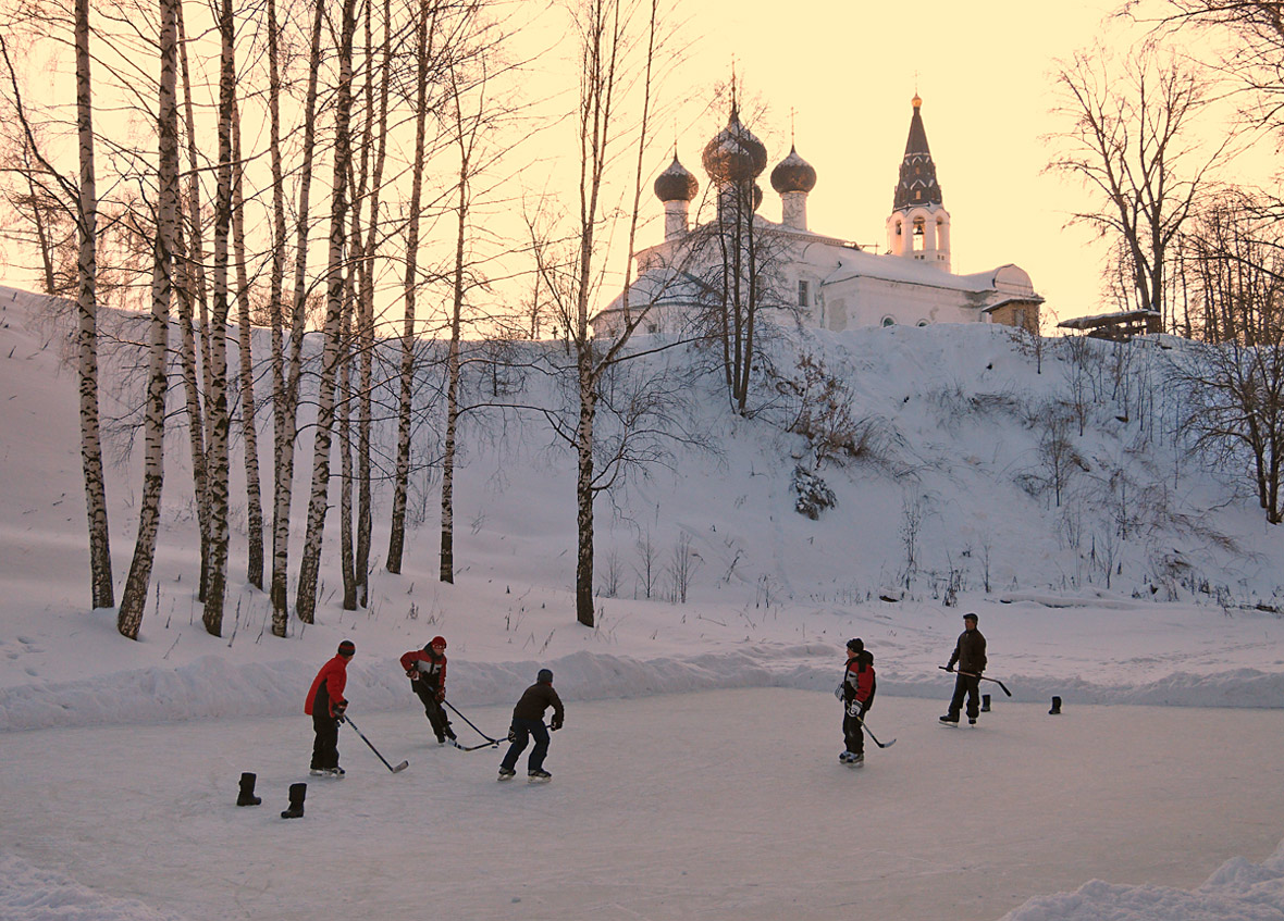 Церковь Троицы (Ярославская область, Ярославль, Пекарская улица, 1 (посёлок Норское))